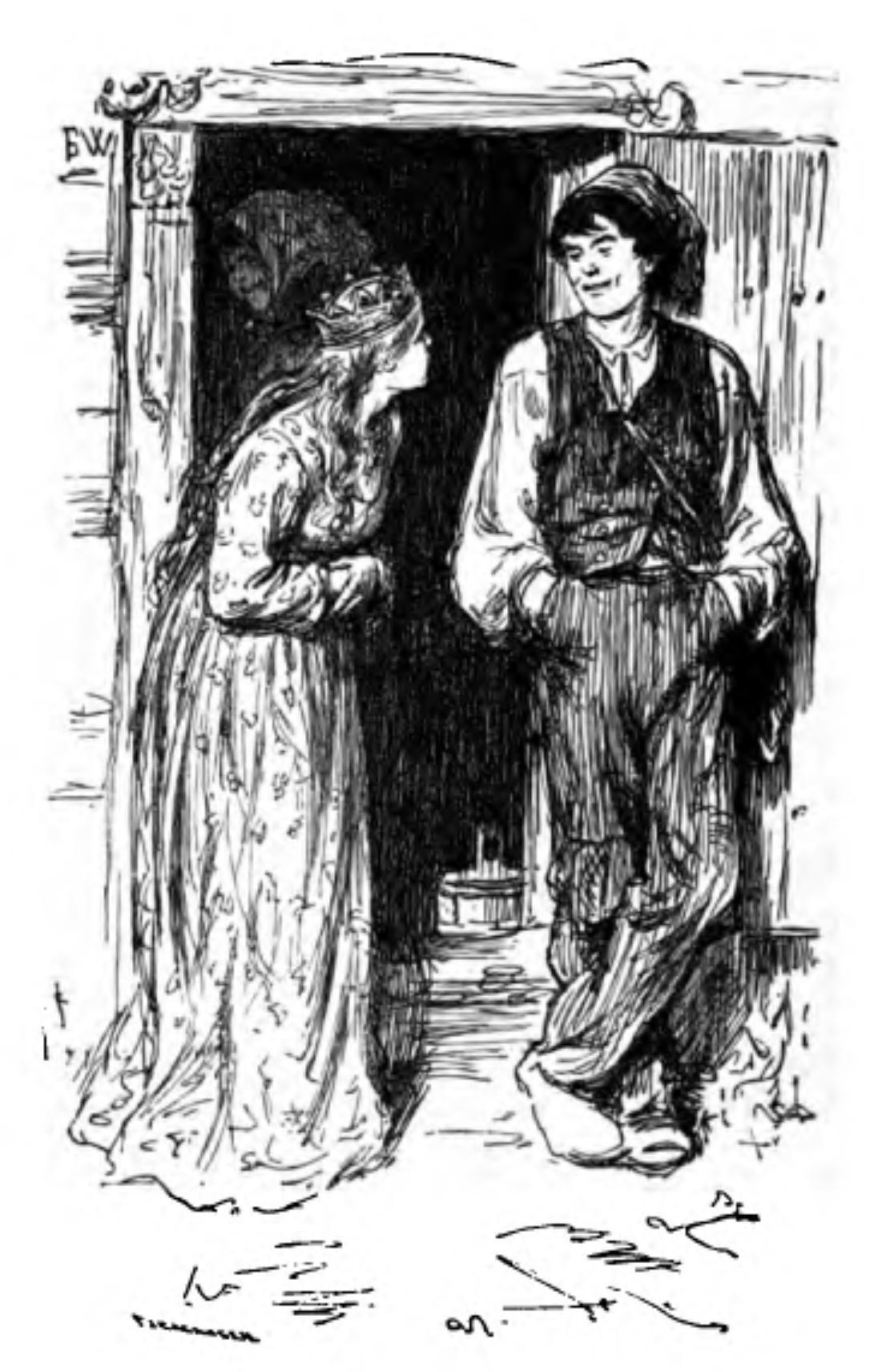 Prinsessa og Oskefisen